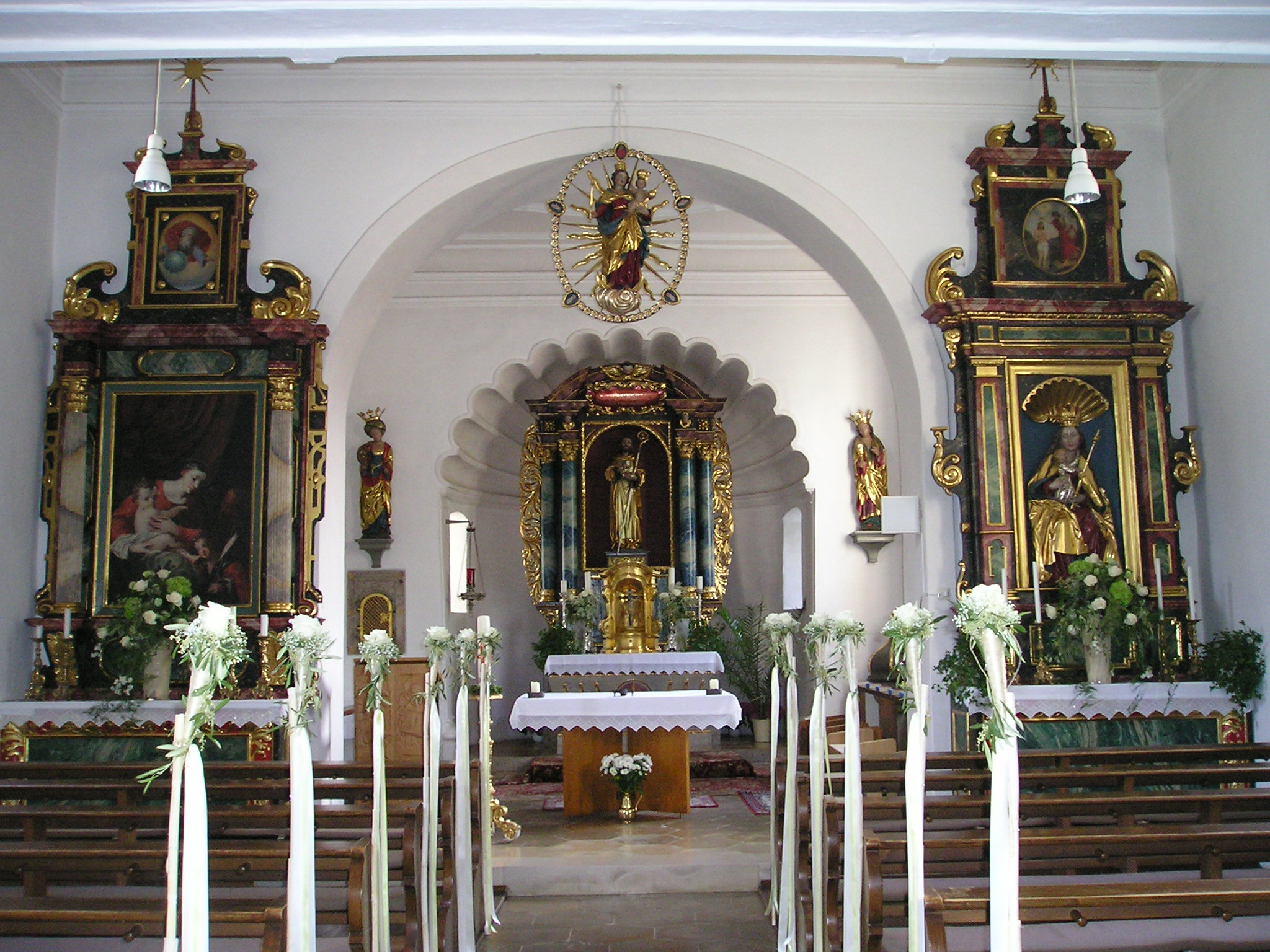 Kircheninneres einer Kirche